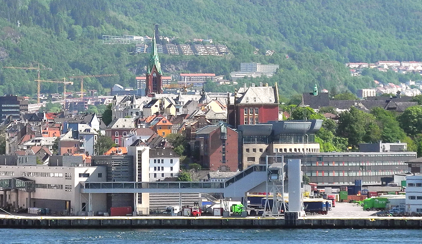 Dragefjellet sett fra Byfjorden.